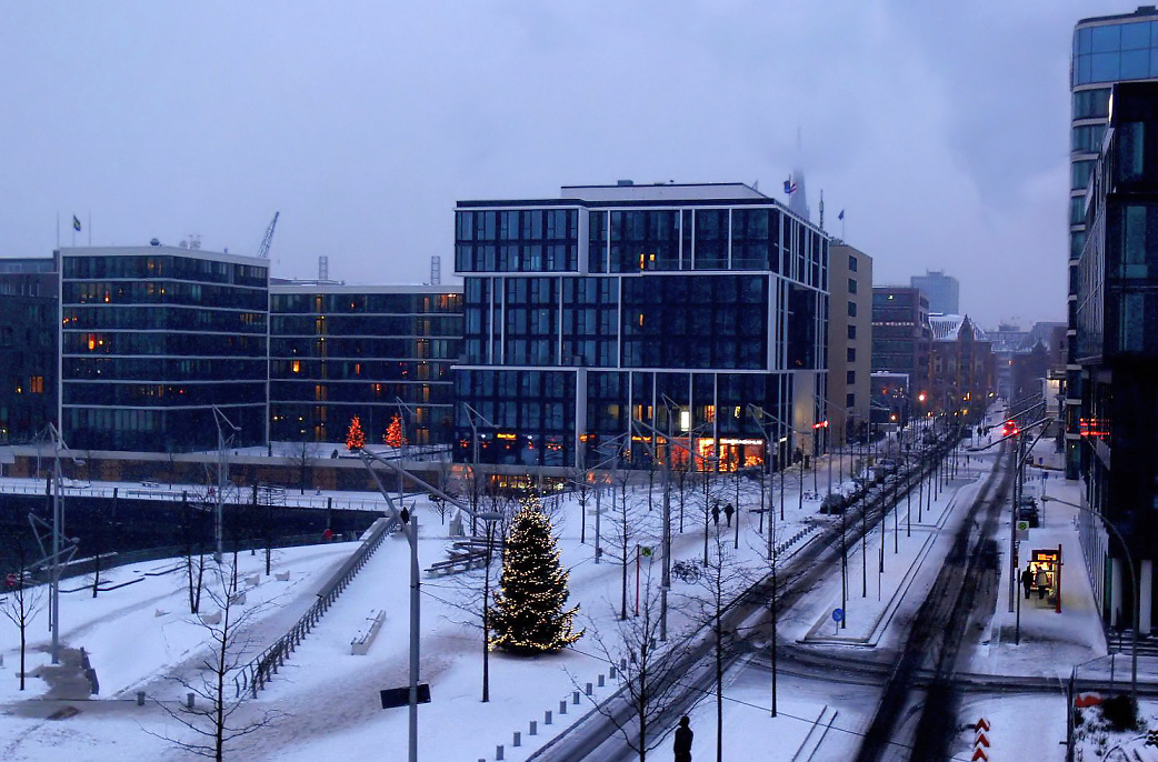 Hafencity